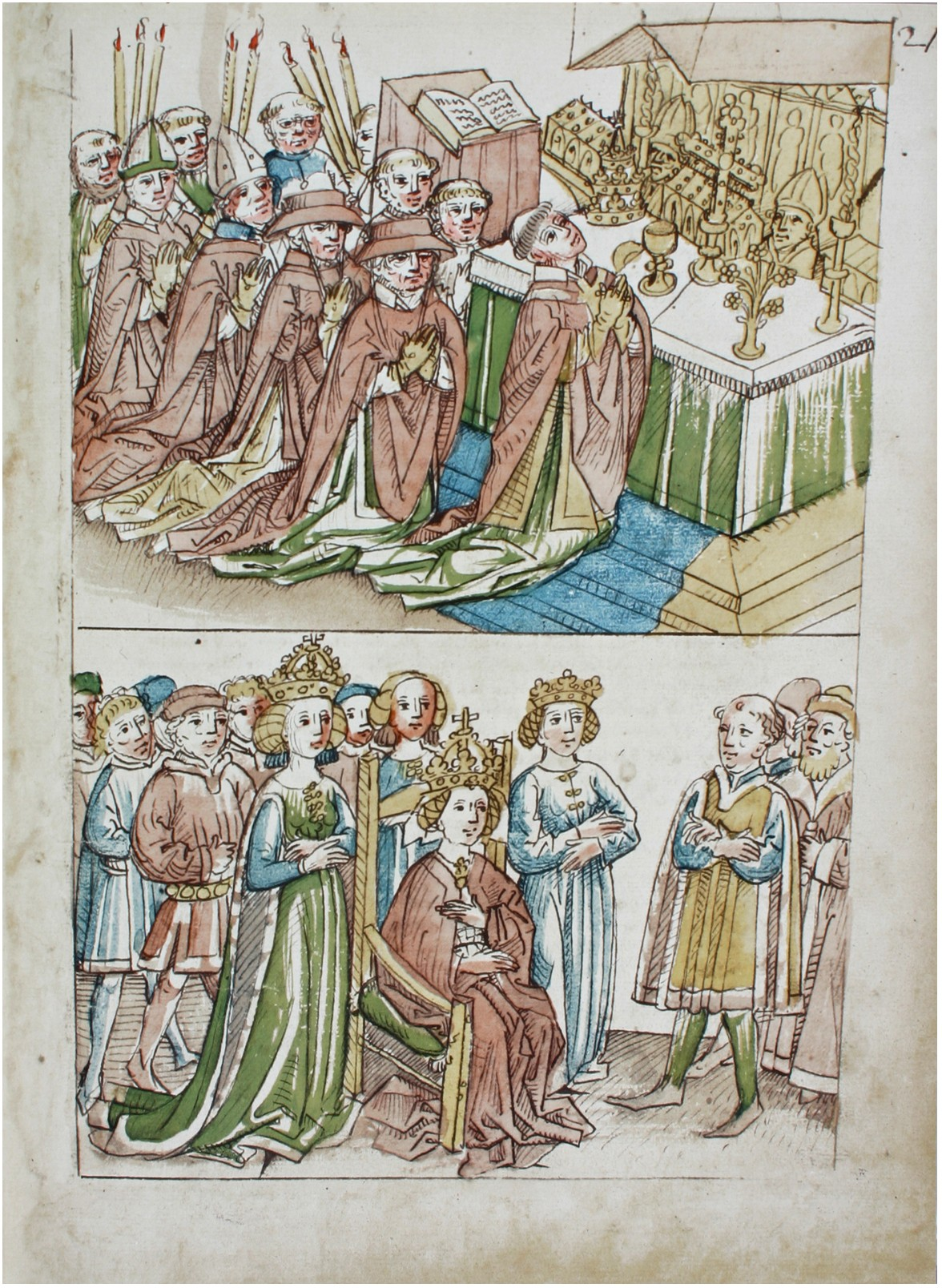 Rosgartenmuseum Konstanz, Hs. 1, Richental: Konzilschronik. In: Feger, Otto (Bearb.): Ulrich Richental: Das Konzil zu Konstanz. Faksimile. Starnberg - Konstanz 1964. Fol. 21r